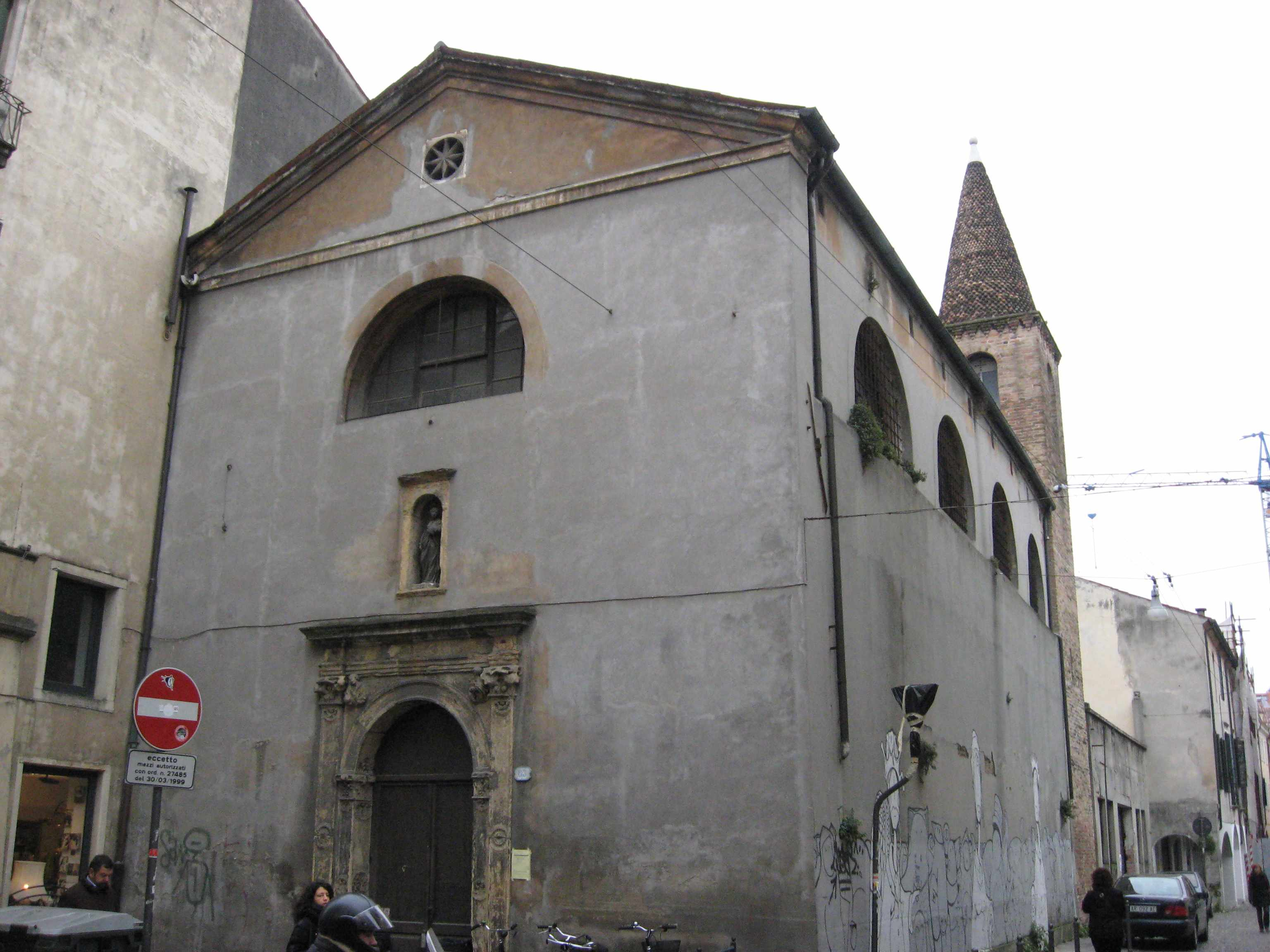 Chiesa S. Agnese Padova